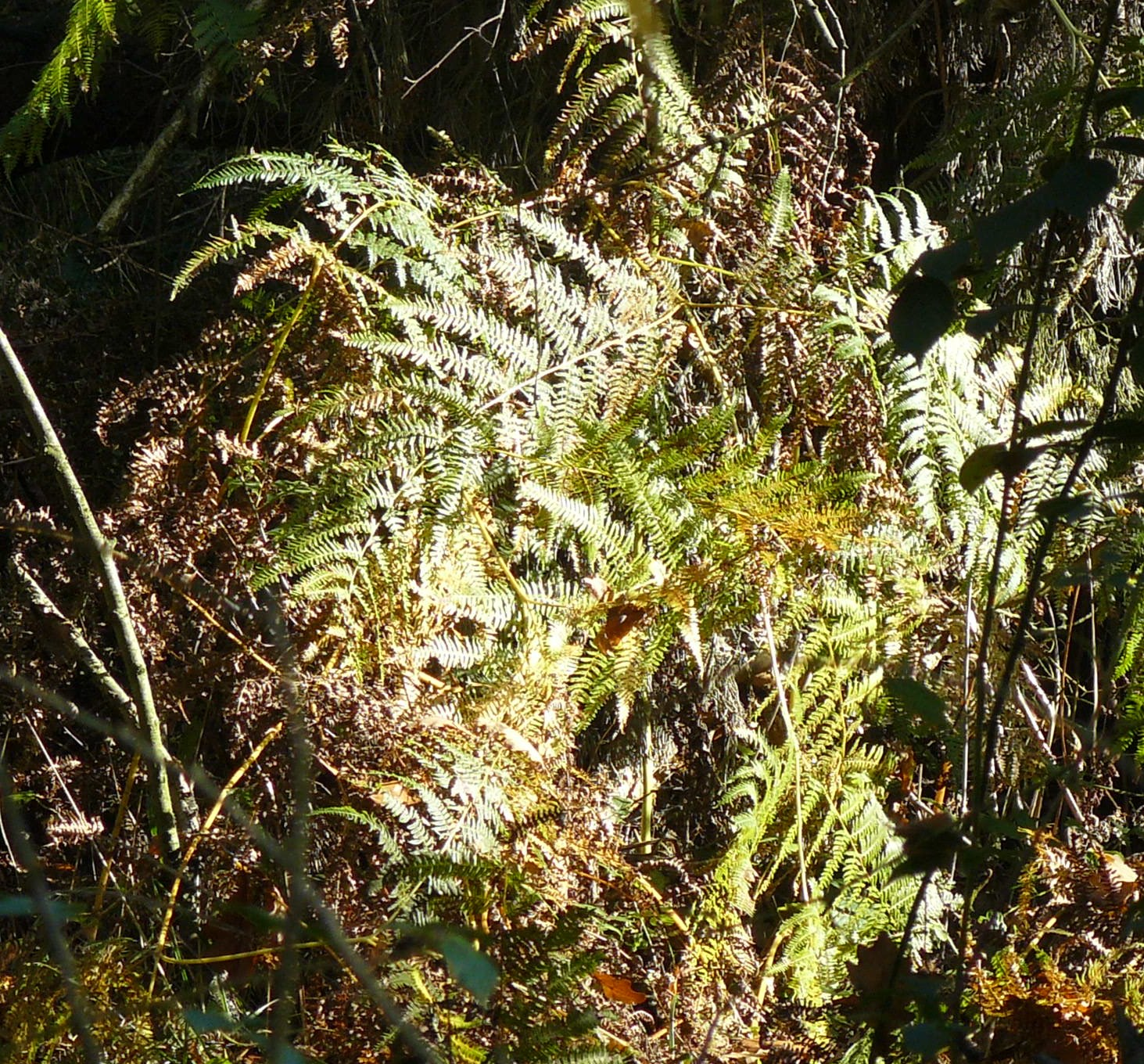 Rezerwat przyrody Baszków - Obszar Chronionego Krajobrazu Dąbrowy Krotoszyńskie i Baszków-Rochy (okolice Baszkowa).